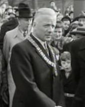 Arnold Jan d'Ailly, burgemeester van Amsterdam van 1946 tot 1956.